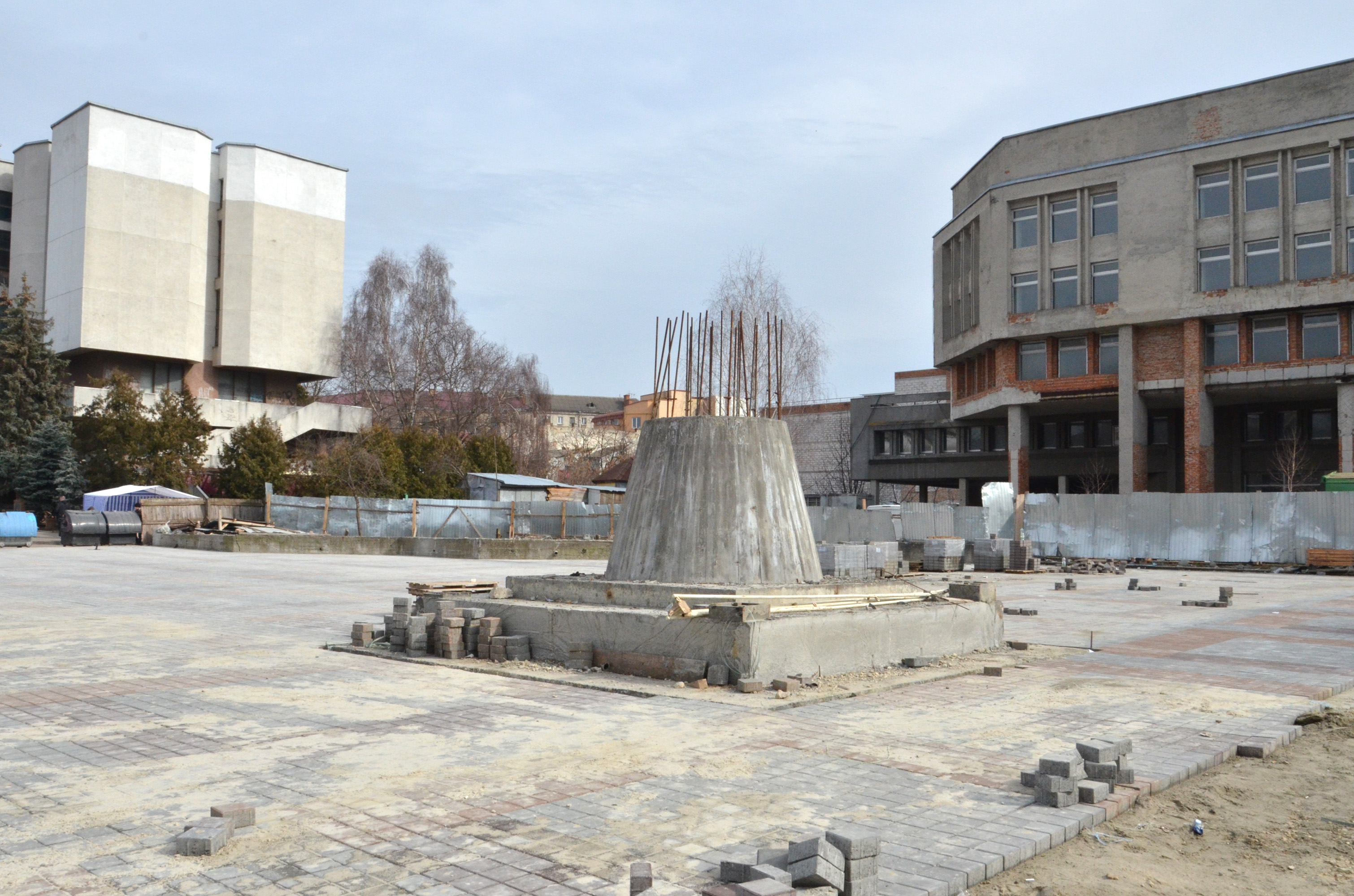 Вкладання бруківки і встановлення підніжжя пам'ятника Небесній сотні на Площі Героїв Євромайдану в Тернополі.